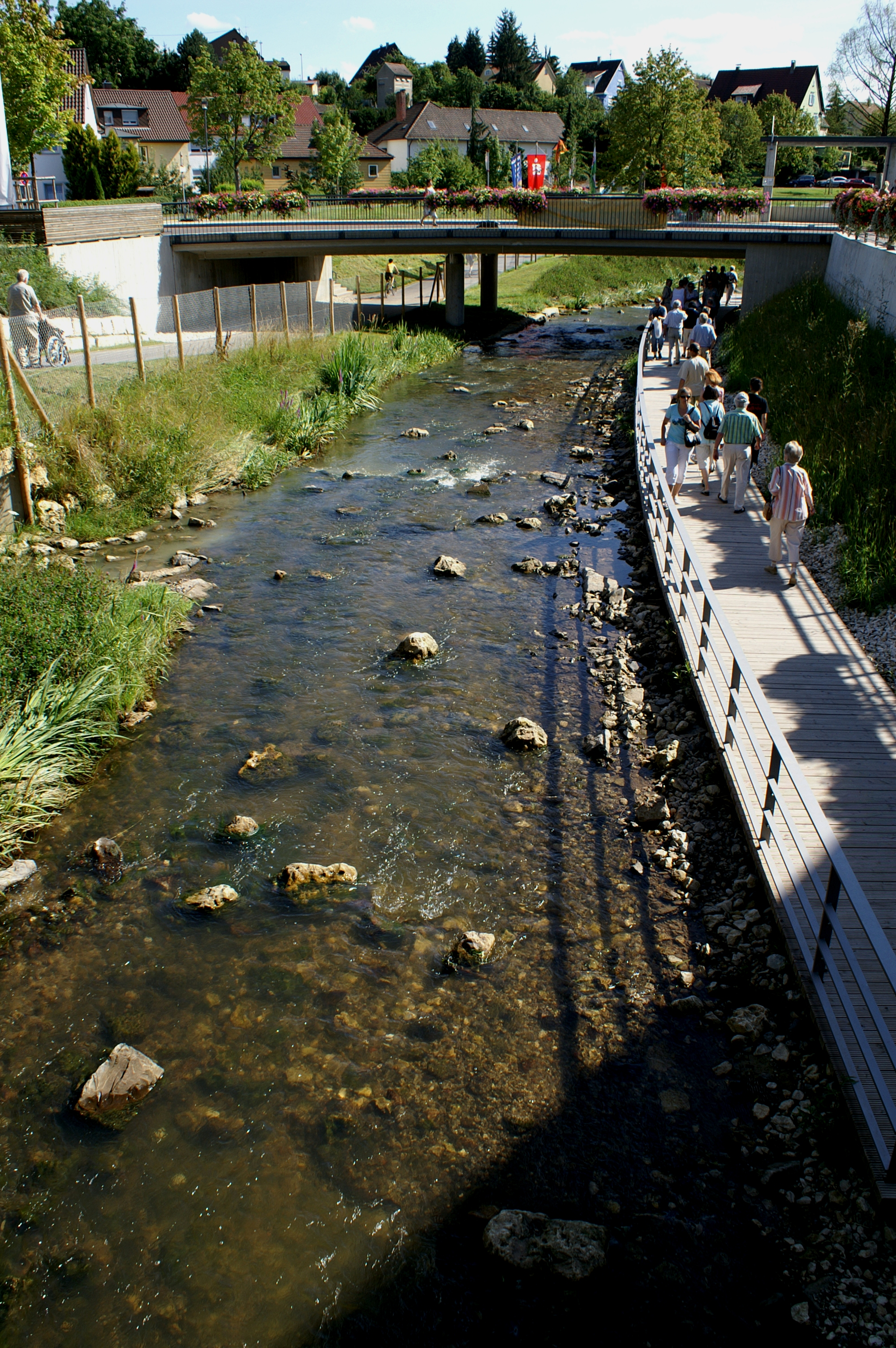 Der Marbach in Rechberghausen im Landkreis Göppingen wurde renaturiert und naturnah gestaltet